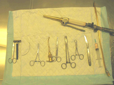 Utensils_used_for_embalming